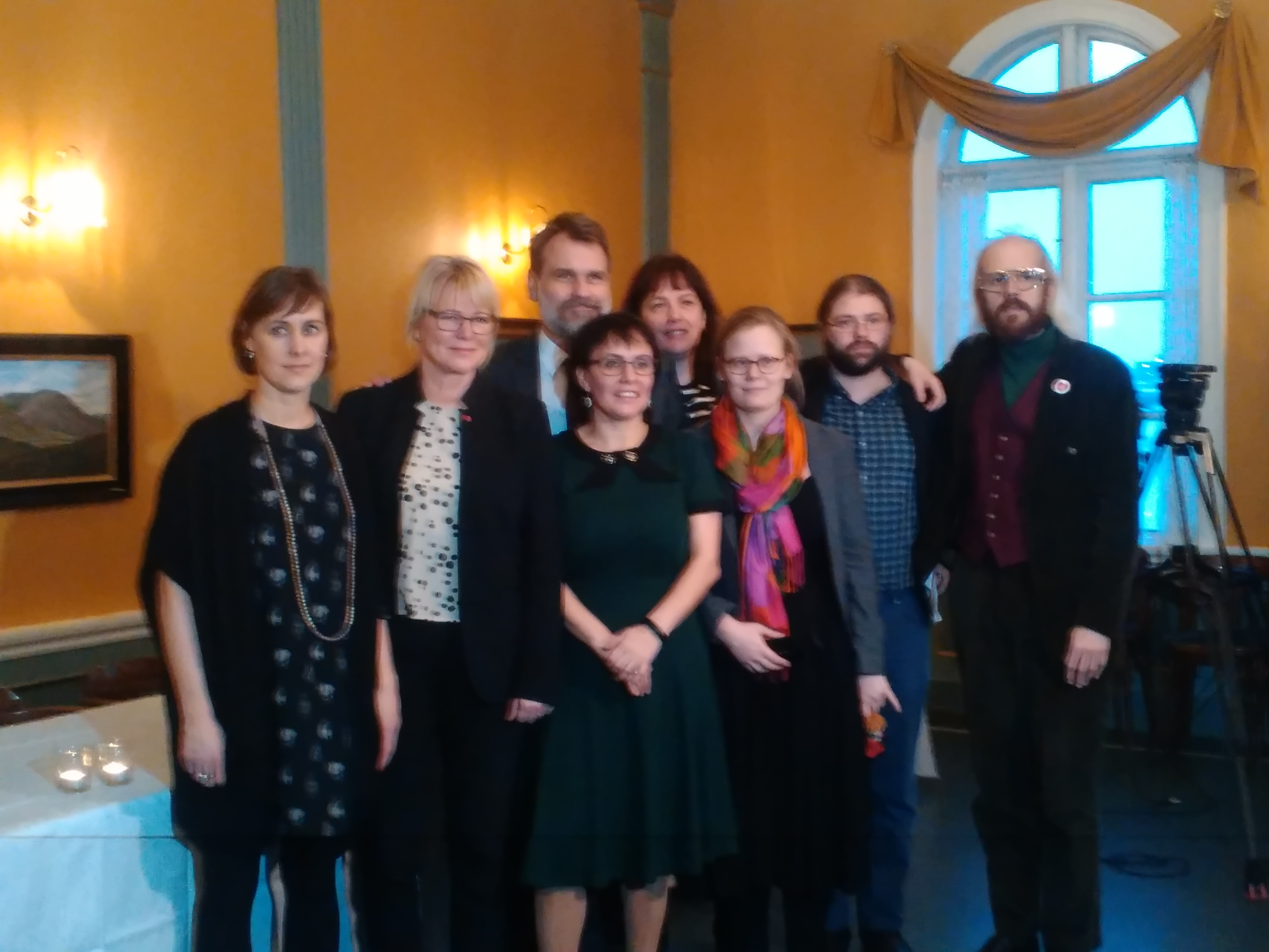 Myndataka af stjórnarandstöðuþingmönnum í desember 2015